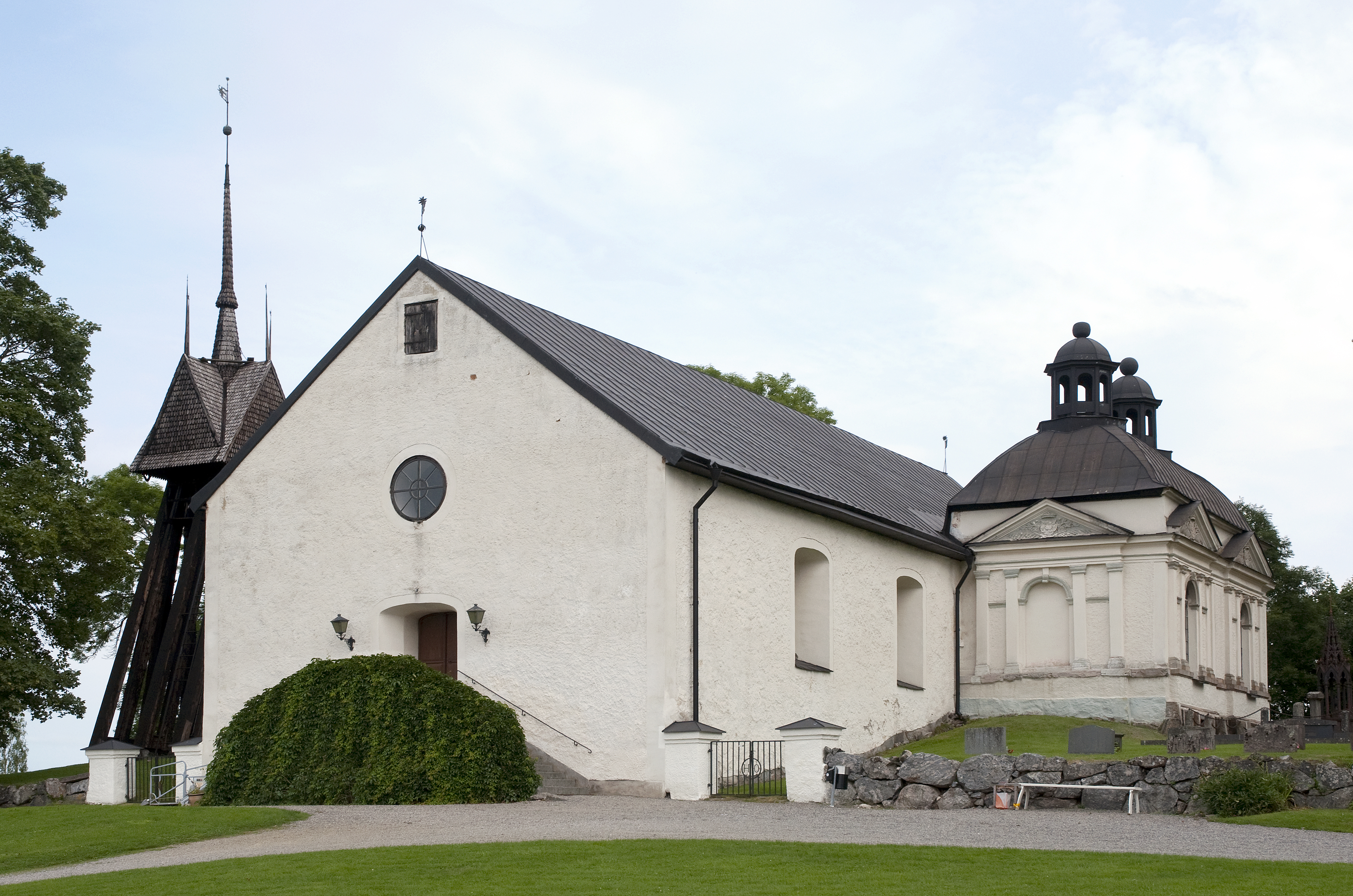 Husby-Oppunda kyrka i Nyköpings kommun.